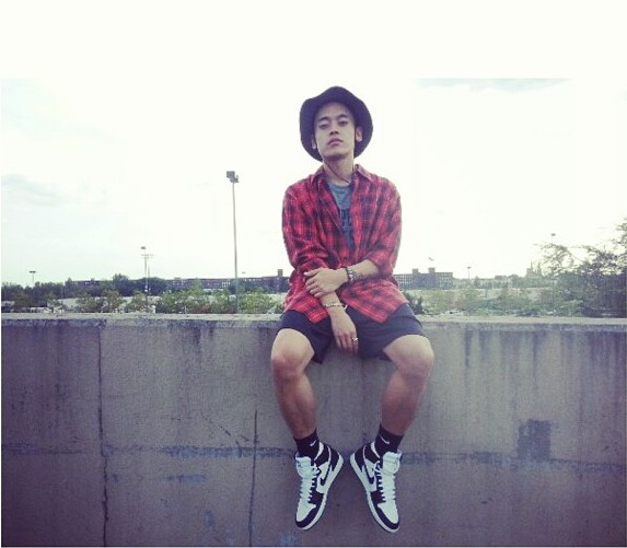 Okasian in 2013